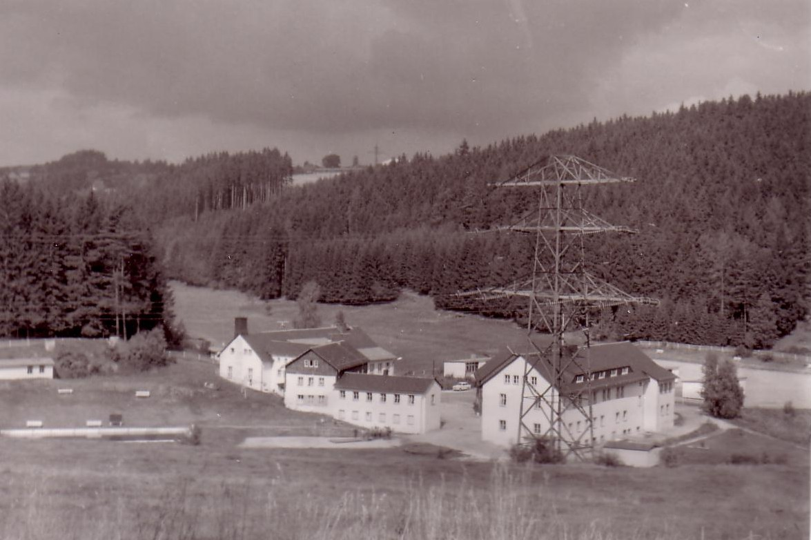 Die Knauermühle in den 80ern.